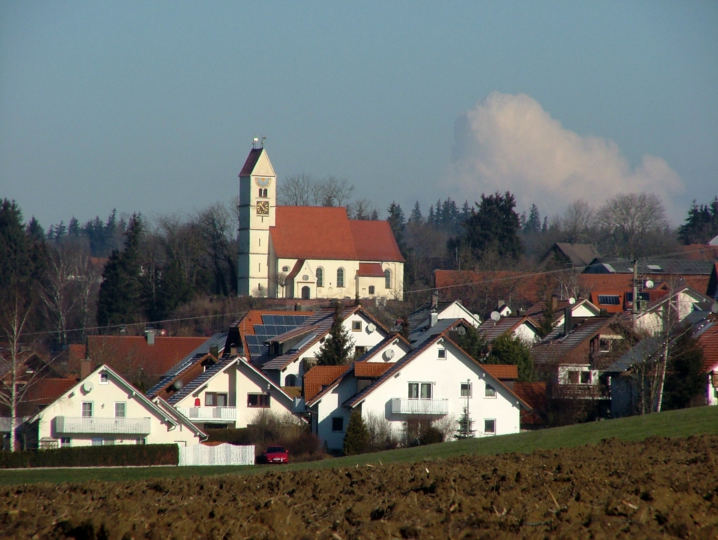 Frickenhausen